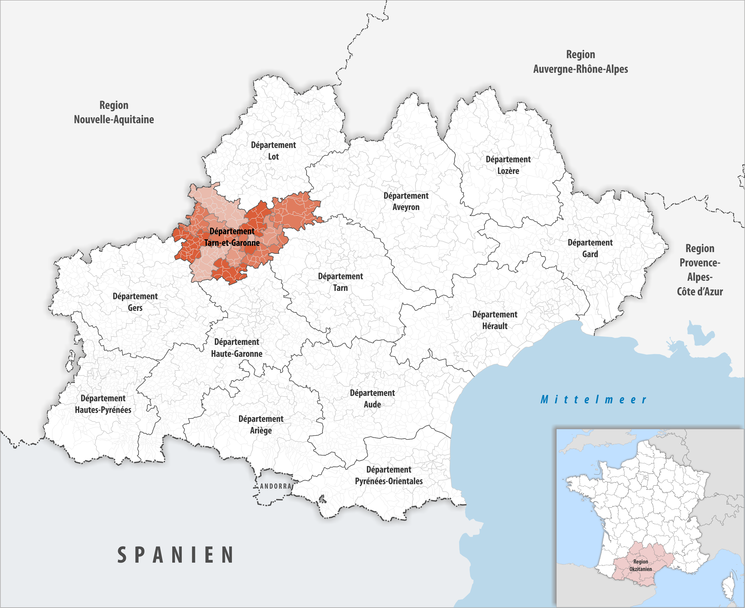 Lage des Departements Tarn-et-Garonne